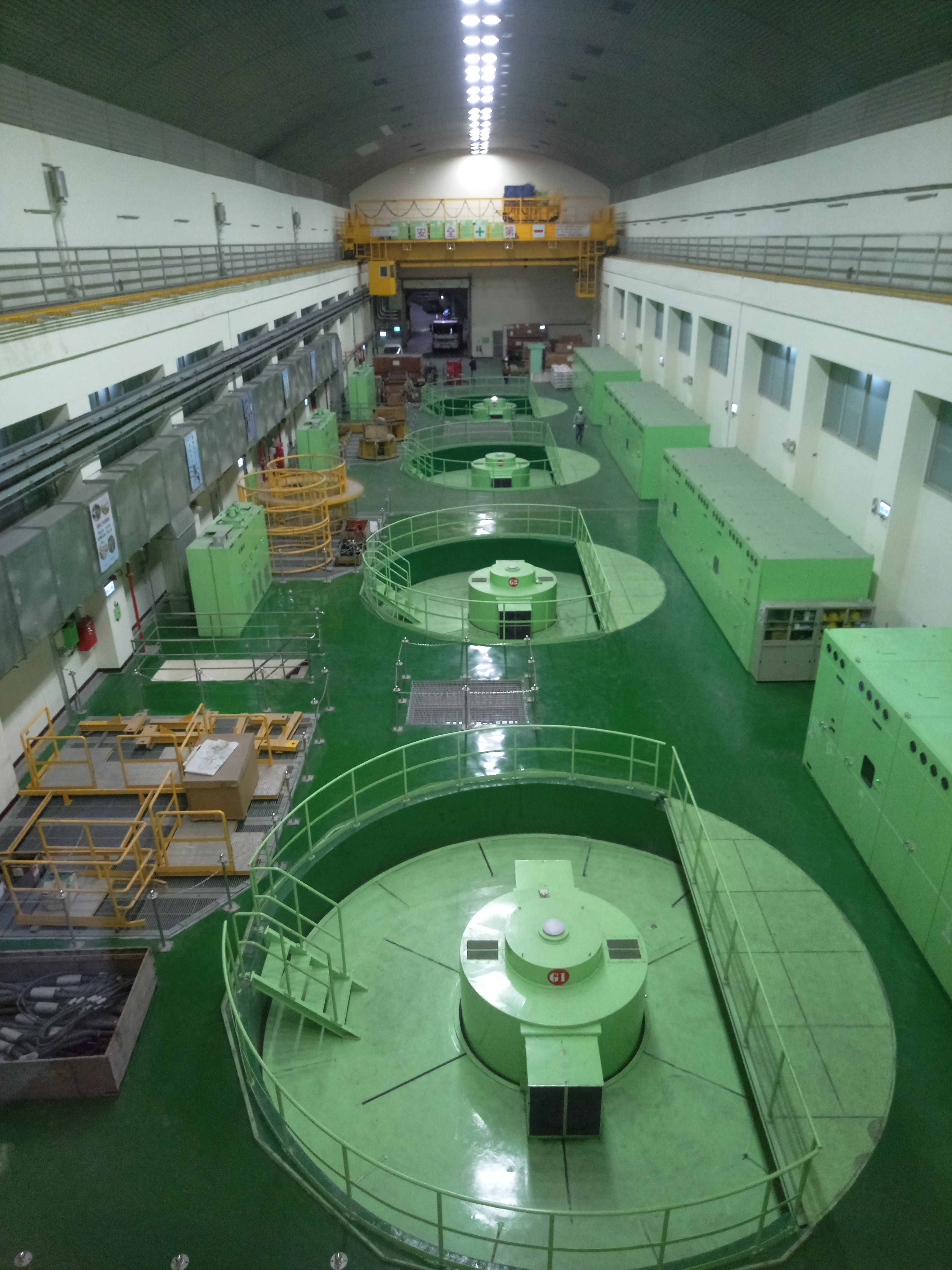 台電大甲溪發電廠青山分廠地下廠房裝機平台一景。